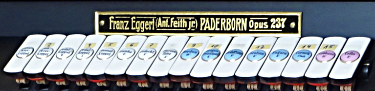 Firmenplakette der Eggert Orgelbau-Anstalt Anton Feith am Spieltisch der Orgel (1923, Opus 237, IIP/11) in der St.-Marien-Kirche (Güsten)